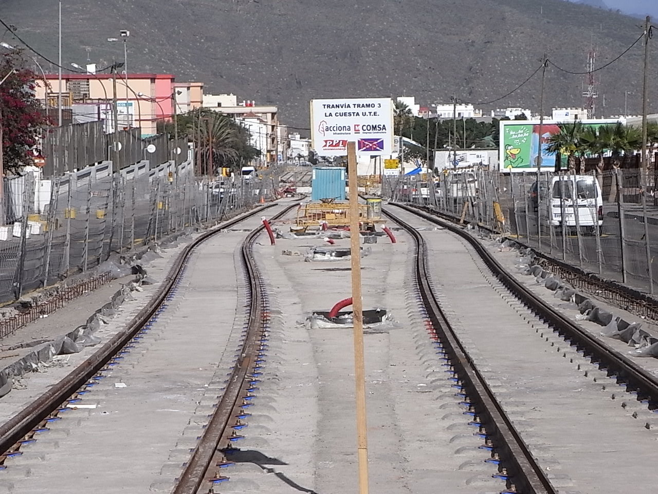 Santa Cruz de Tenerife, konstrulaboroj ĉe estonta tram-haltejo "Ingenieros".